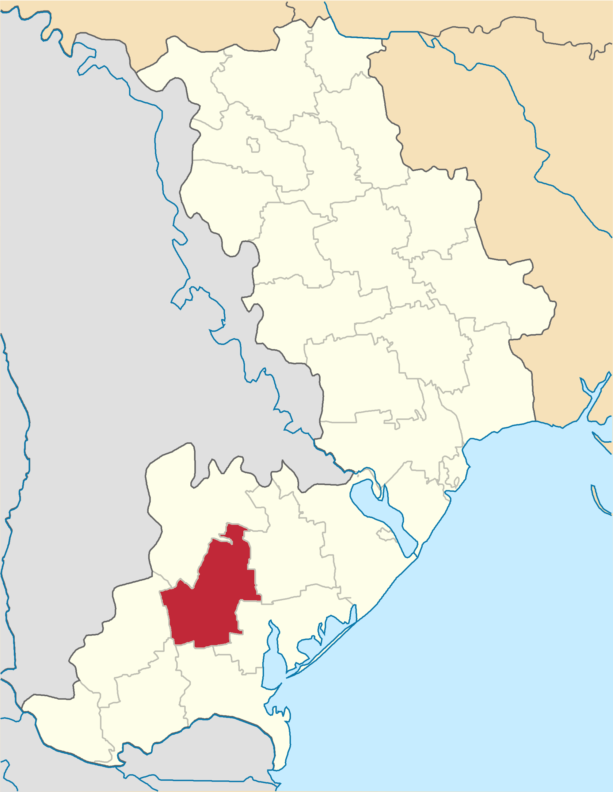 Artsyzkyi-Raion map